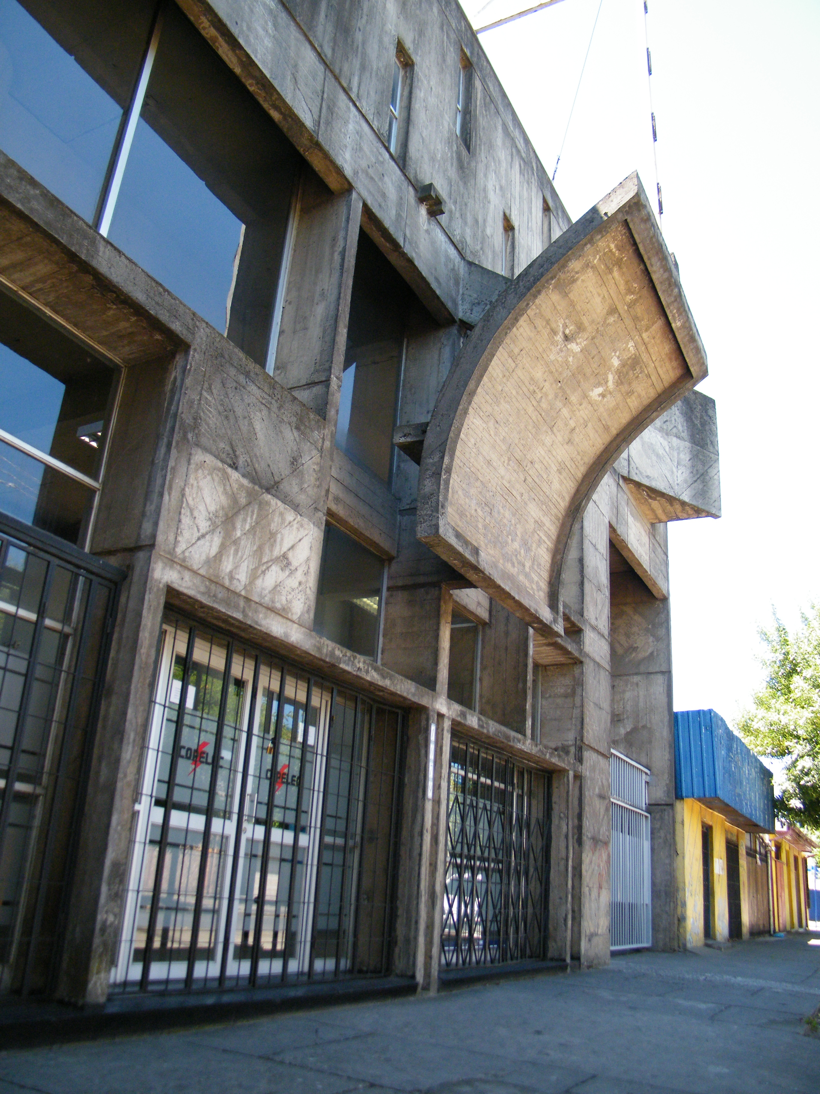 Edificio de la Cooperativa Eléctrica de Chillán, Copelec. Detalle del acceso al público a las oficinas comerciales, hacia calle Maipón. This is a photo of a national monument in Chile: 2032